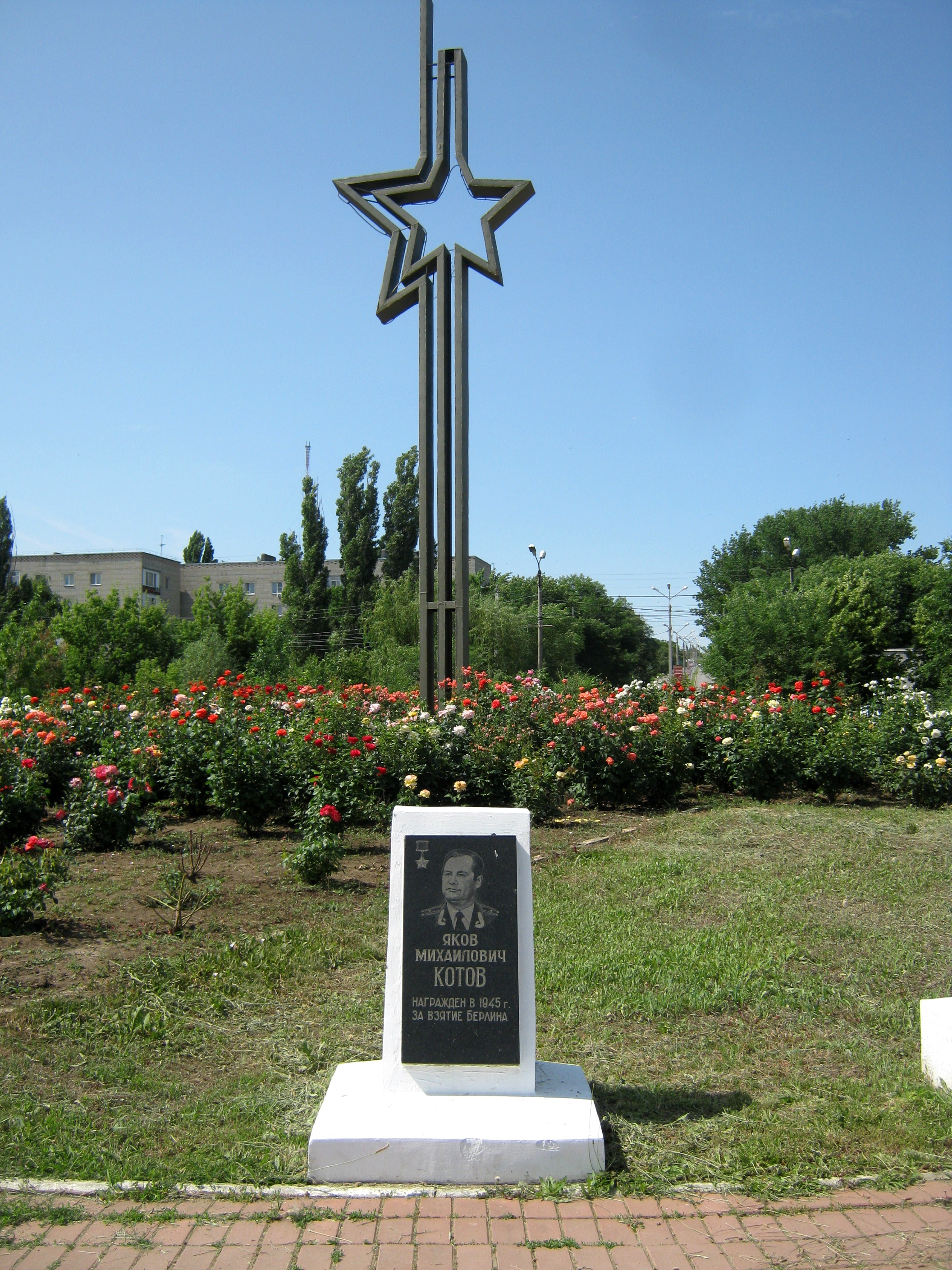 Каменск - Котов 1